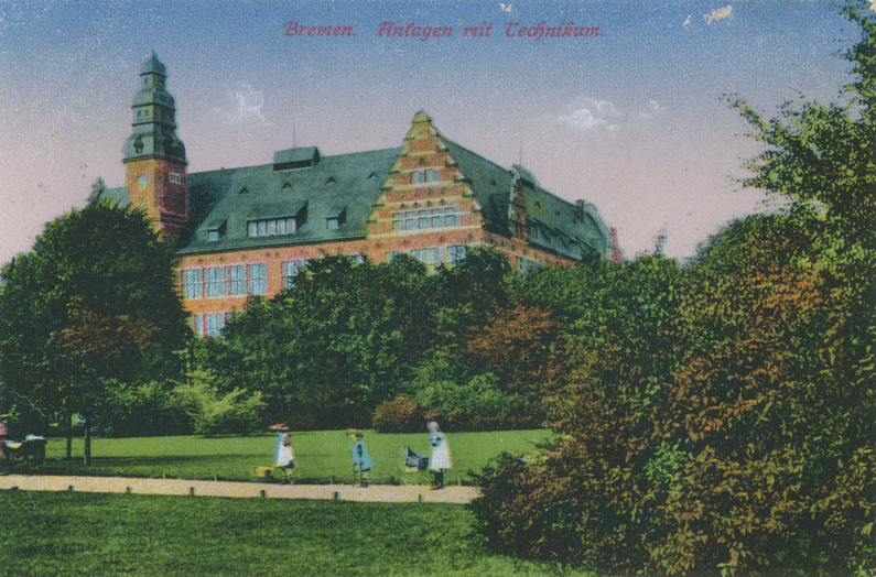 Postkarte mit dem Motiv des Bremer Technikums vor 1917. Heute der M-Trakt der Hochschule Bremen, wurde allerdings inzwischen mehrfach umgebaut.